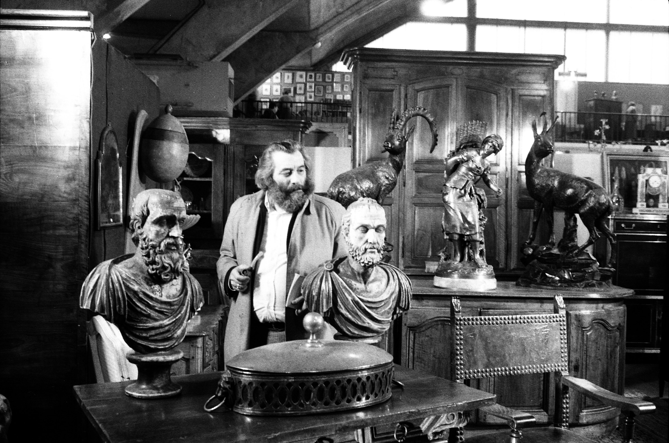 Parc des expositions. Le 6 Novembre 1980. Vue d'ensemble d' un stand au salon des antiquaires. Au centre de l'image, un homme regarde deux sculptures représentants des bustes antiques .